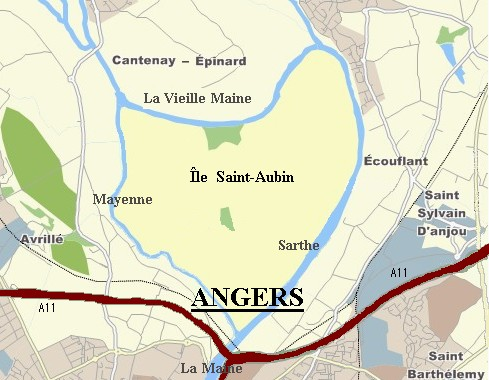 Carte de l'île Saint-Aubin à Angers